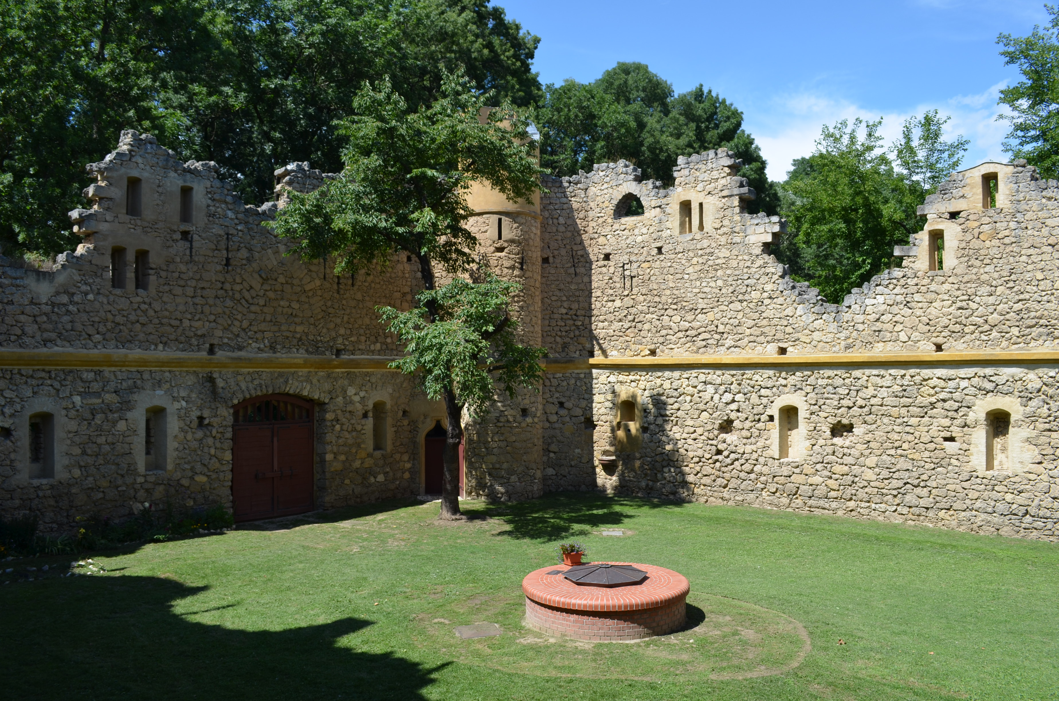 Janův hrad, Vlčí louka 348, Podivín.